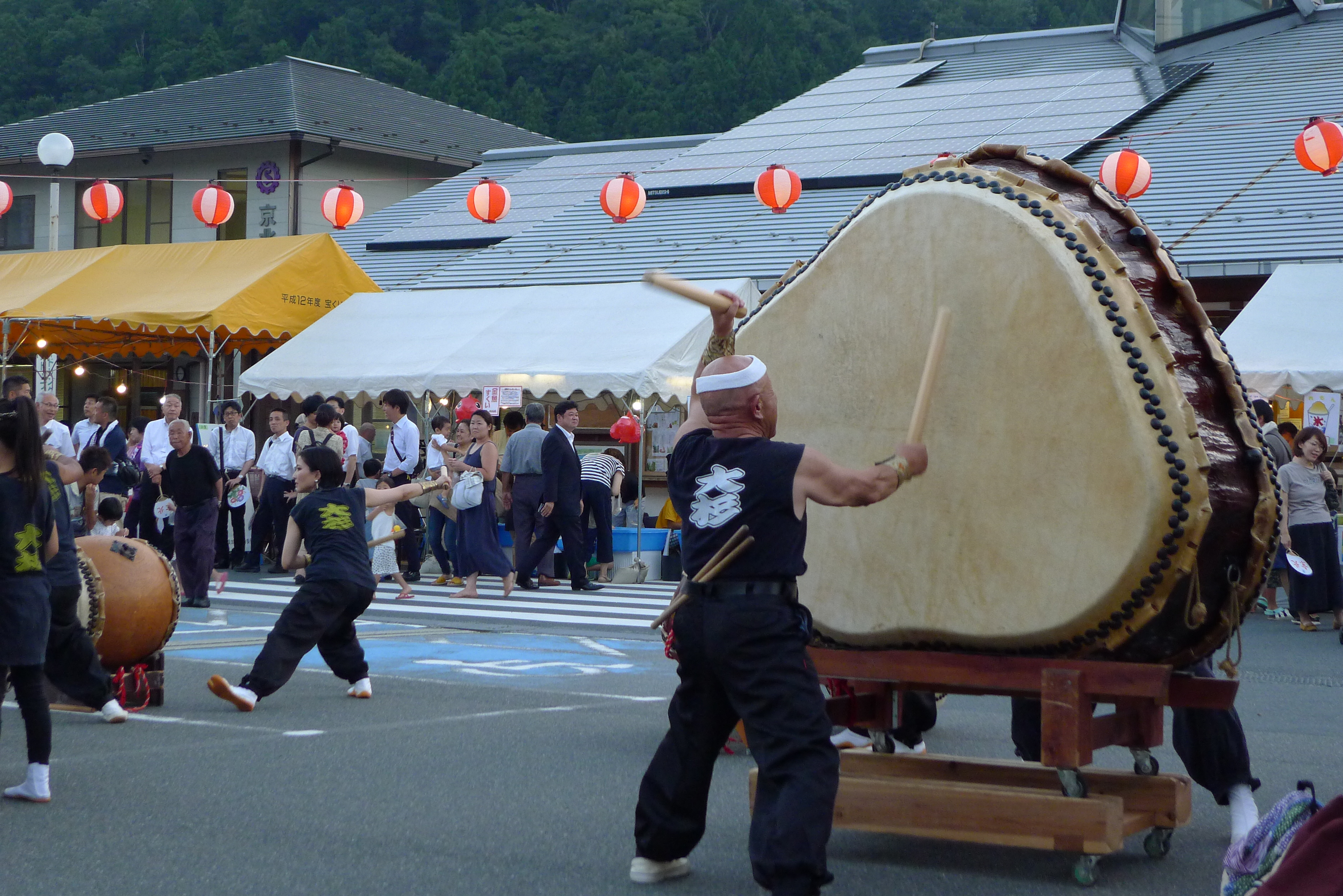 北山杉の伏状台杉の幹を切り出して芯を刳り貫いて作った太鼓、京北夏祭りにて